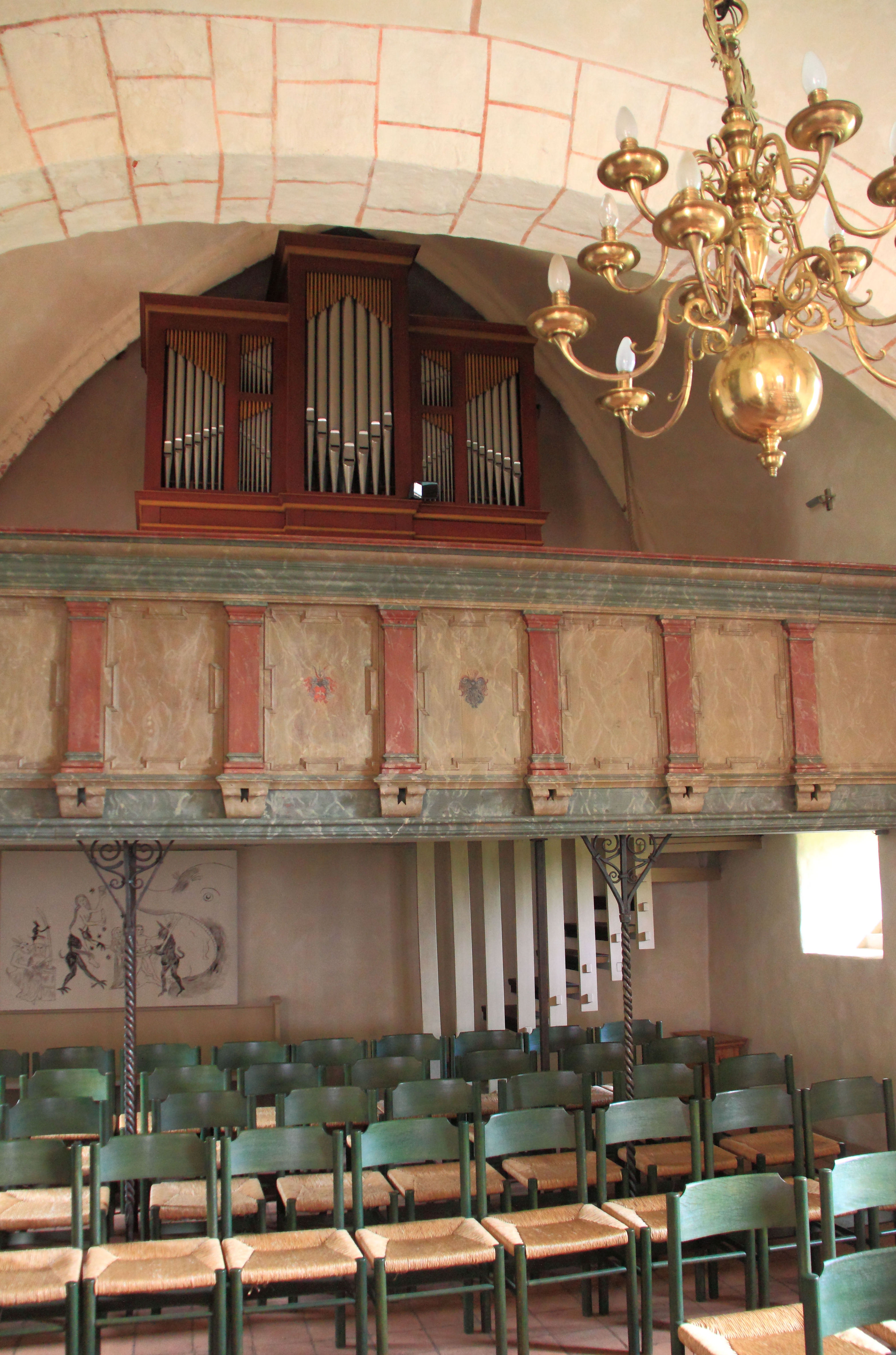 Orgel in der St.-Katharinen-Kirche Schönemoor, Oldenburg, Niedersachsen